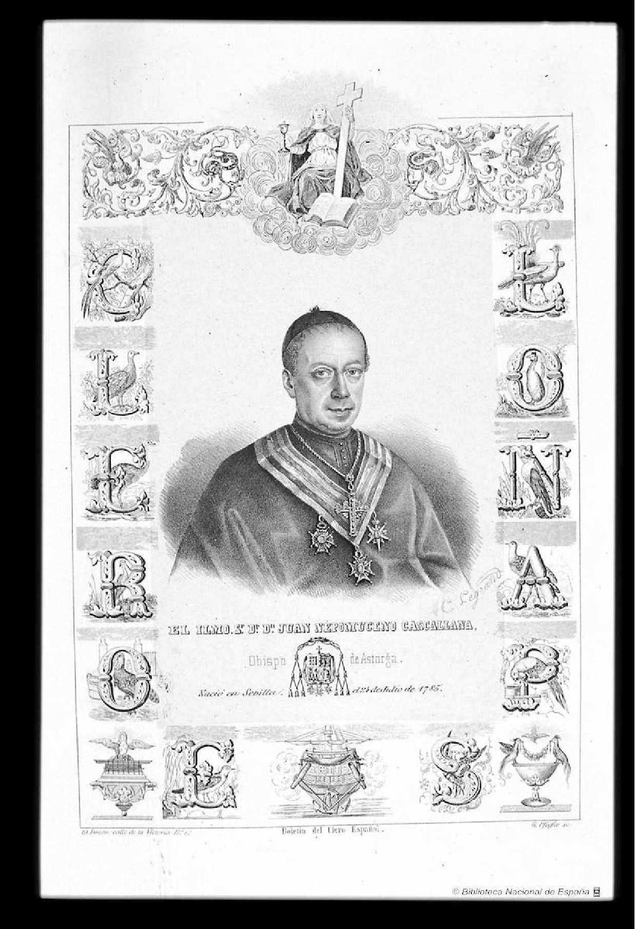 Retrato de Juan Nepomuceno Cascallana y Ordóñez, obispo de Astorga. Ilustración de Boletín del Clero Español. Litografía de Luis Carlos Legrand.